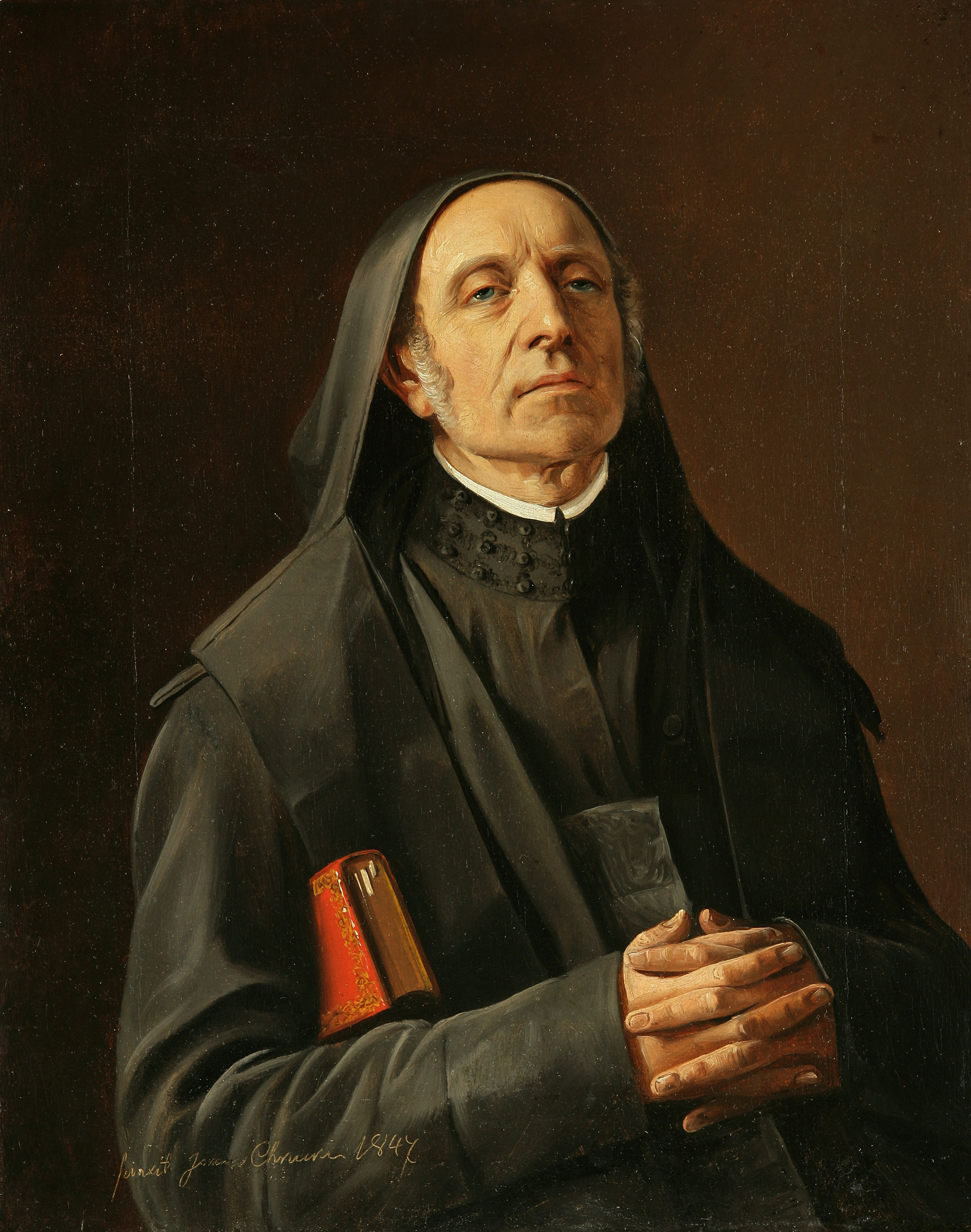 Портрет В. Лисовского. 1847. Холст, масло. 45×35. Национальный художественный музей Республики Беларусь. Изображен Викентий Лисовский, иеромонах, духовник архиепископа Иосифа Семашко.